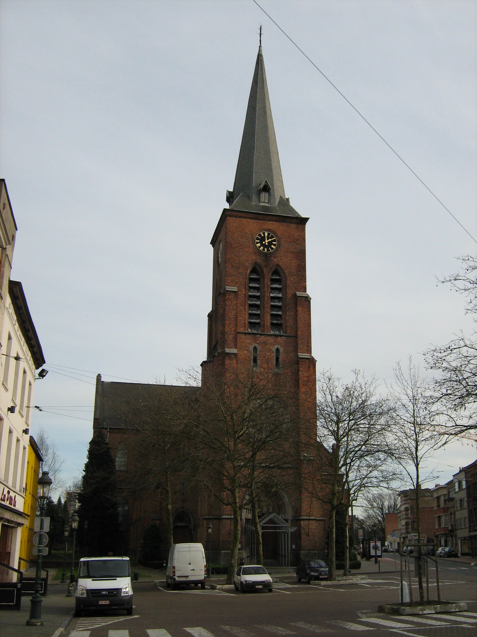 Sint-Pieterskerk op het Kardinaal Mercierplein te Jette (Brussel, België)